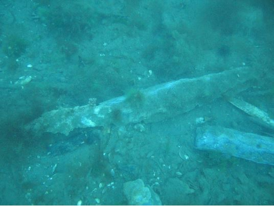 Hvalbein neðansjávar við gömlu hvaveiðistöð Normanna á Dvergasteinseyri í Álfafirði á Vestfjörðum